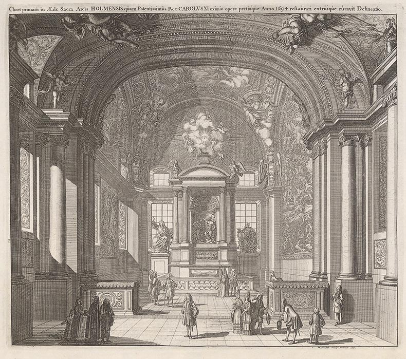 Titel Chori primarii in Aede Sacra Arcis Holmensis quam Potentissimus Rex Carolus XI eximio opere pretioque Anno 1694 restaurari extruique curavit Delineatio. Titel i översättning Högkoret i Stockholms slottskyrka, som den mäktige konungen Karl XI lät inreda med mycken omsorg och kostnad år 1694